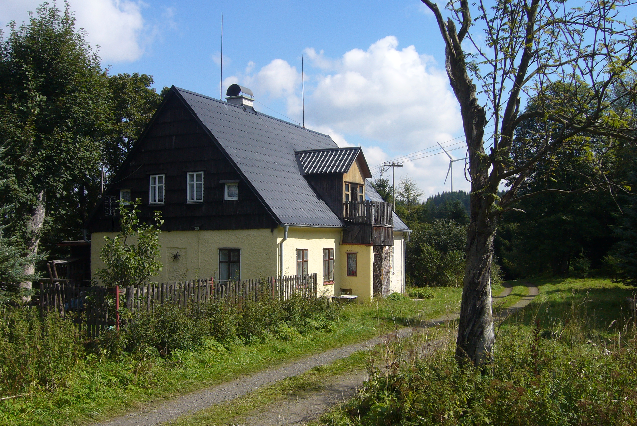 Jeden z dochovaných domů